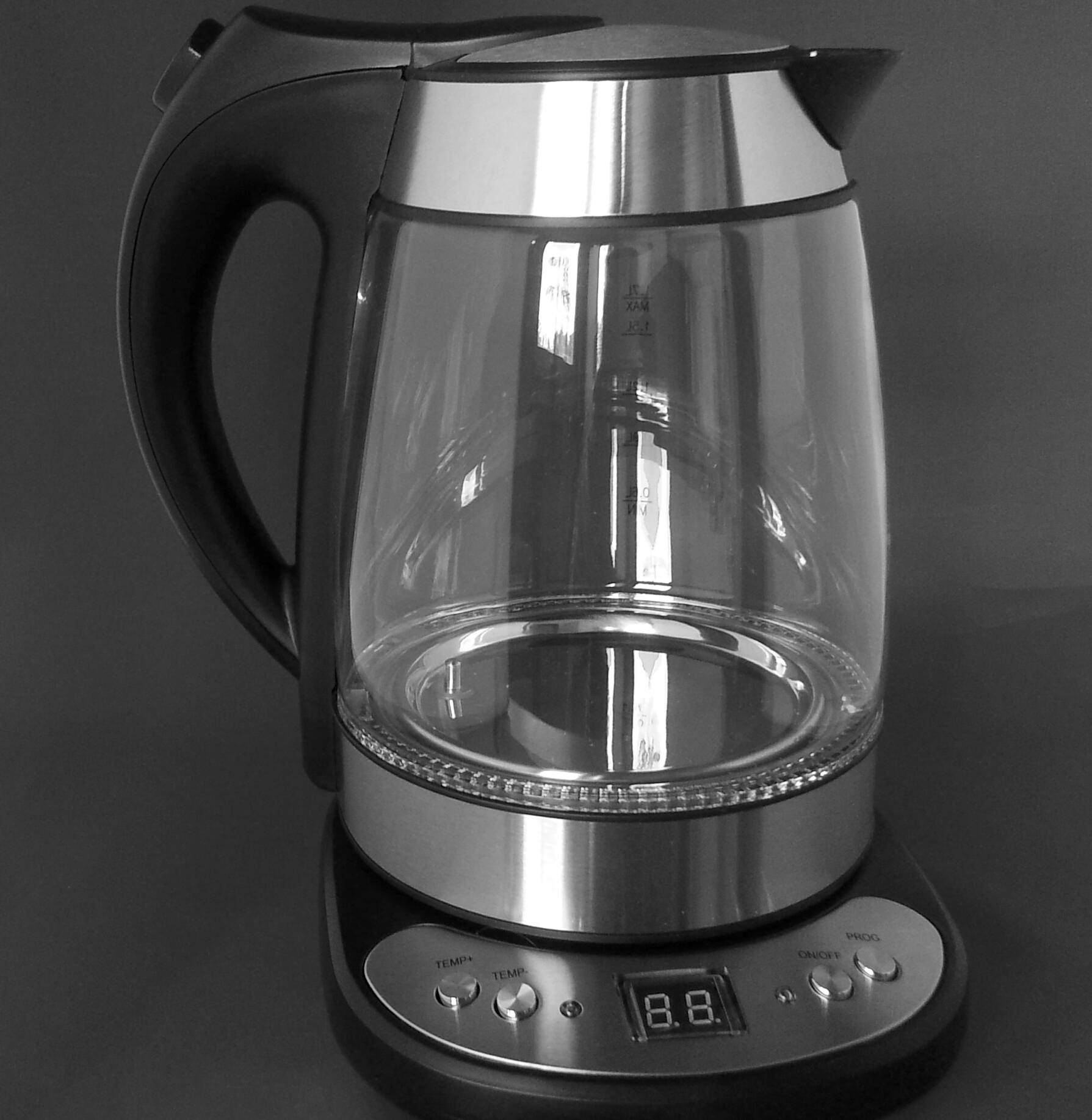 Modell eines Wasserkochers bei dem die Temperatur eingestellt werden kann. Zur Verfügung gestellt von